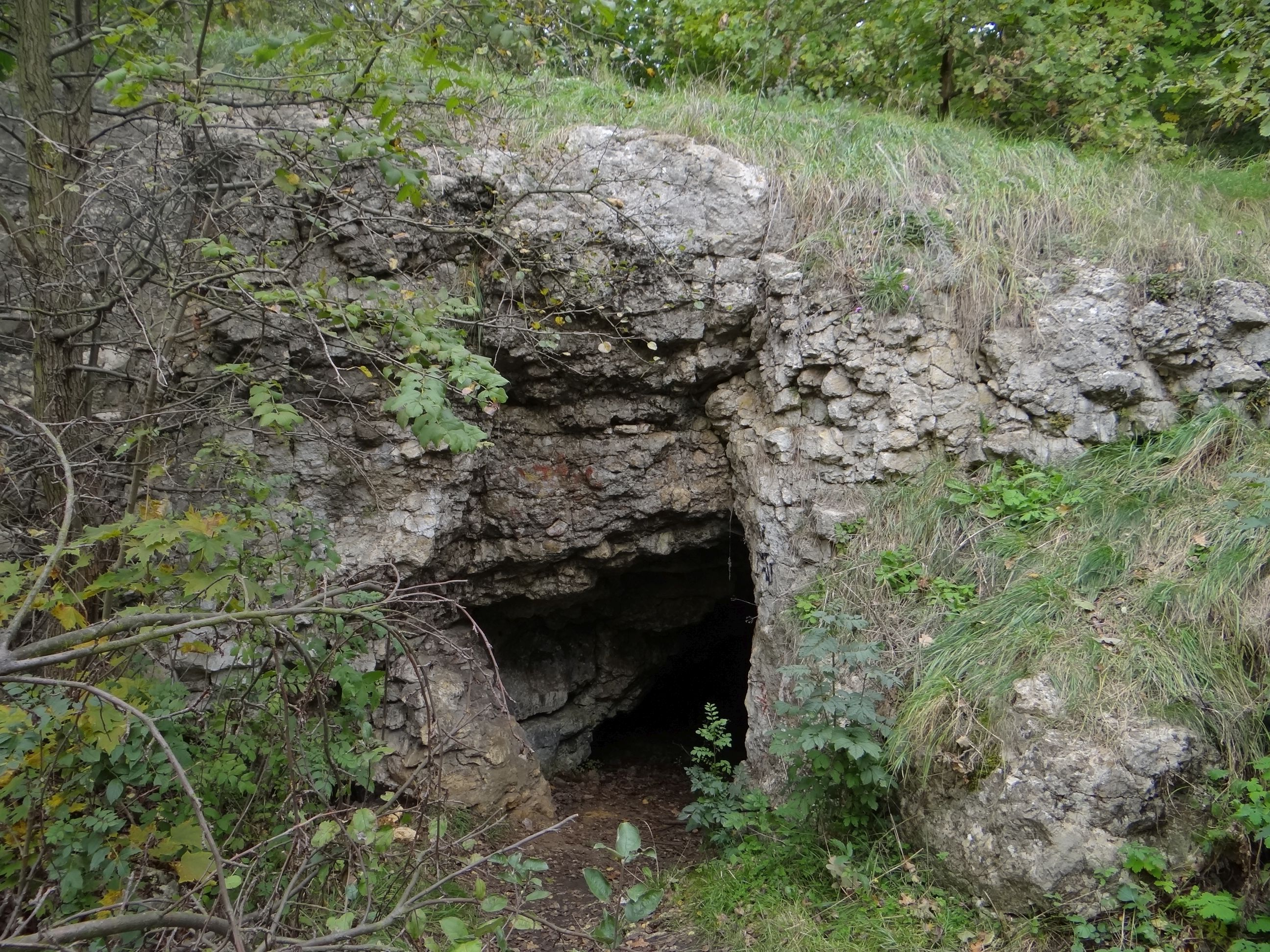 Jaskinia Twardowskiego